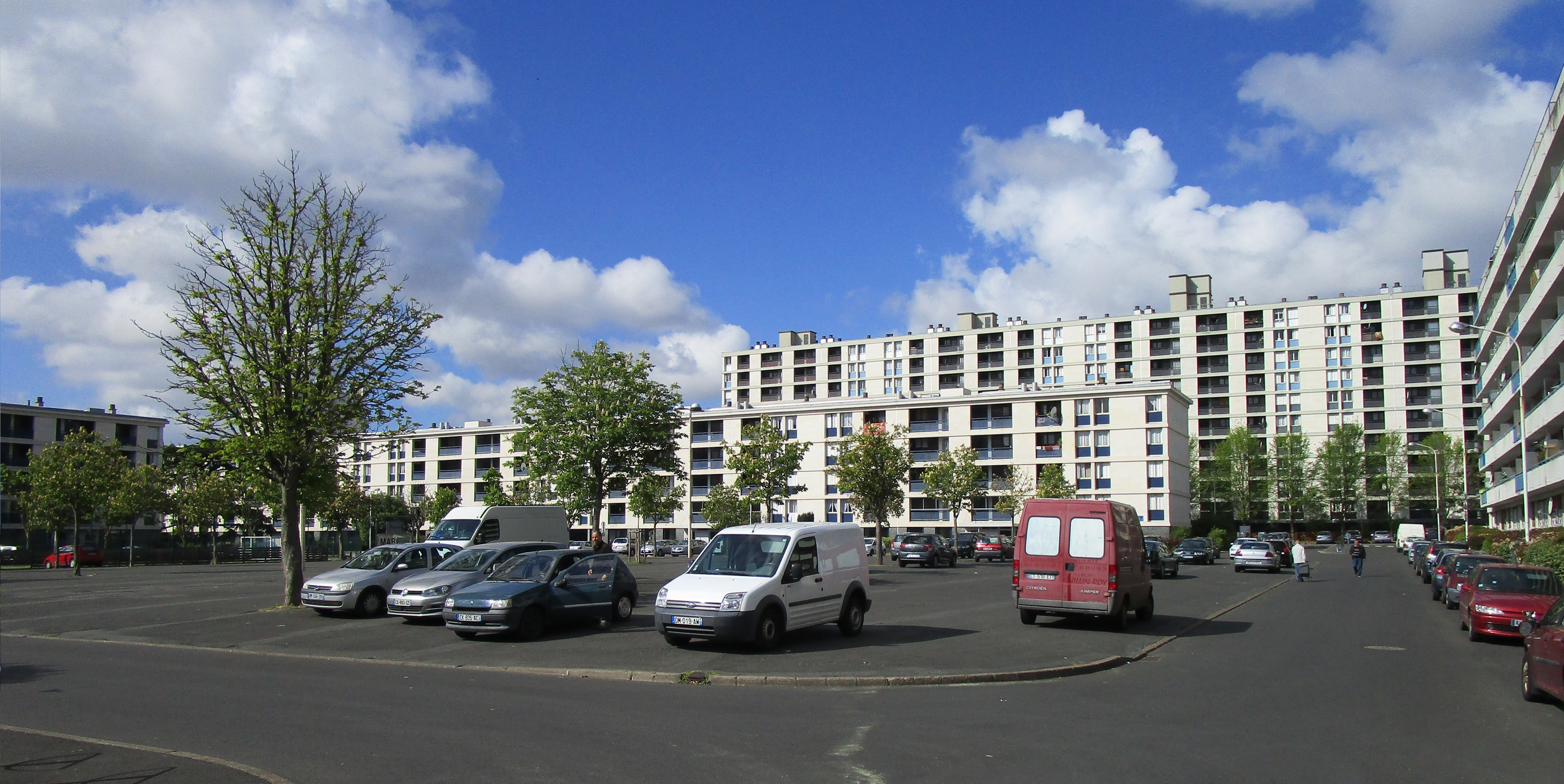 La Place Saint-Paul à Tours, dans le quartier Sanitas